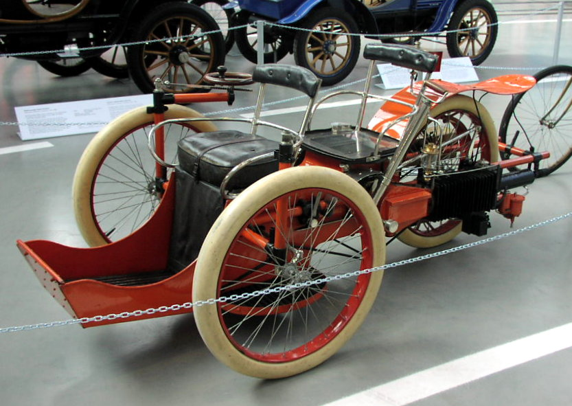 Léon-Bollée Tricycle (1896)